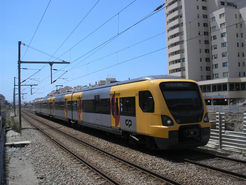 CP = chemins de fer portugais La 3400 est une automotrice assurant les trains de la banlieue de Porto.